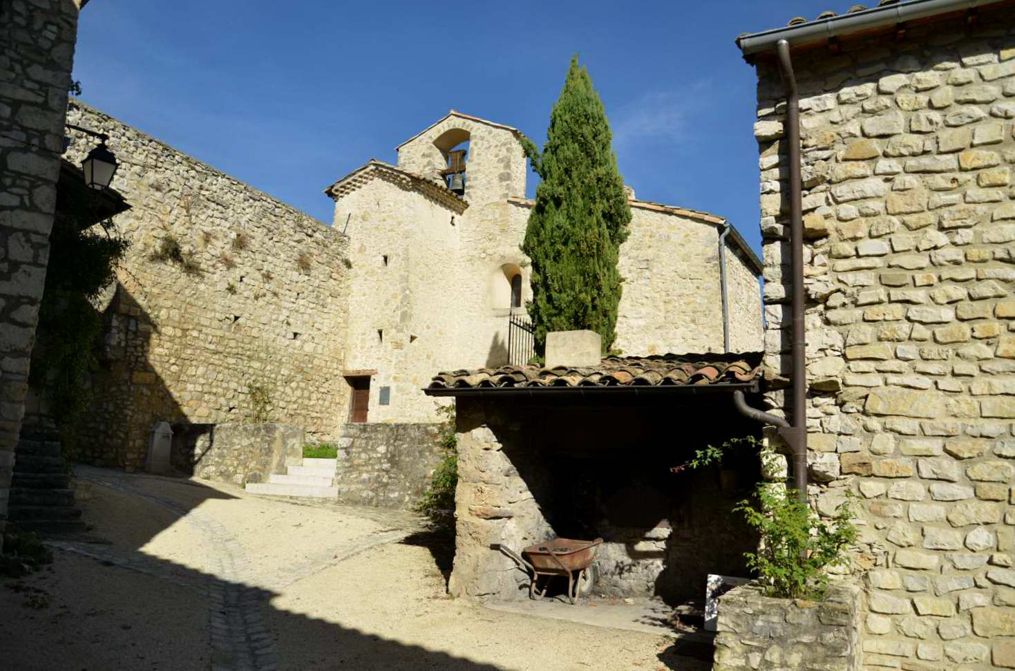 Eglise saint pierre